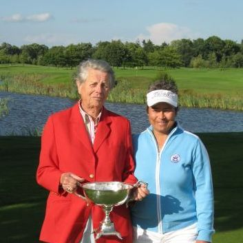 Annelies Eschauzier feliciteert Metta Hageman met het winnen van de Eschauzier Cup in 2008